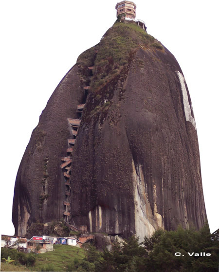 Imagen del Peñon de Guatape en Antioquia Colombia